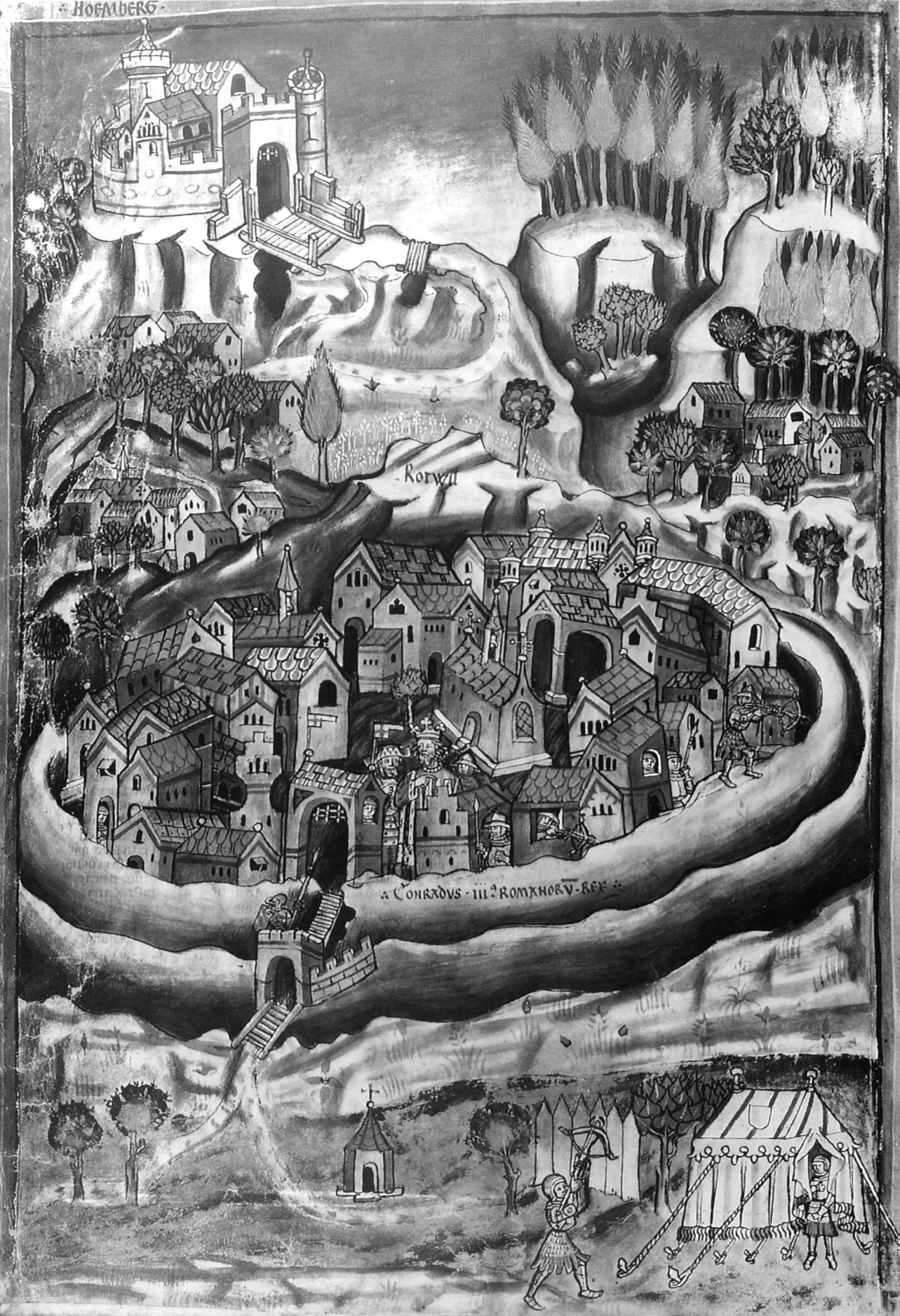 Darstellung der Reichsstadt Rottweil, aus: Rottweiler Hofgerichtsordnung, Handschrift VI.110. In: Jacob, Frank-Dietrich (Hrsg.): Historische Stadtansichten, E.A. Seemann Leipzig, 1982, S. 20, Abb. 12